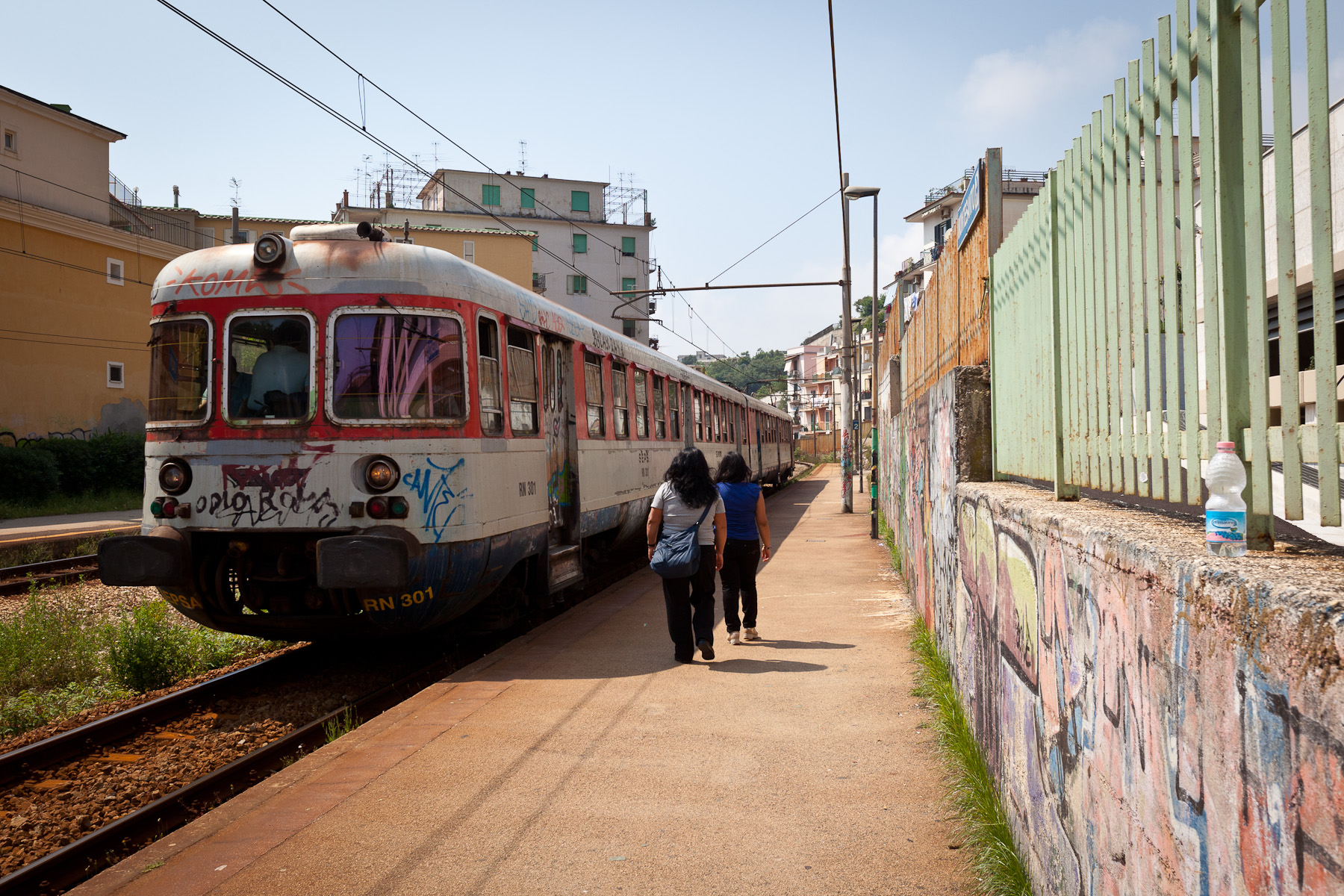 Stazione ferroviaria di Gerolomini a Pozzuoli. In sosta un elettrotreno ET 300 della SEPSA